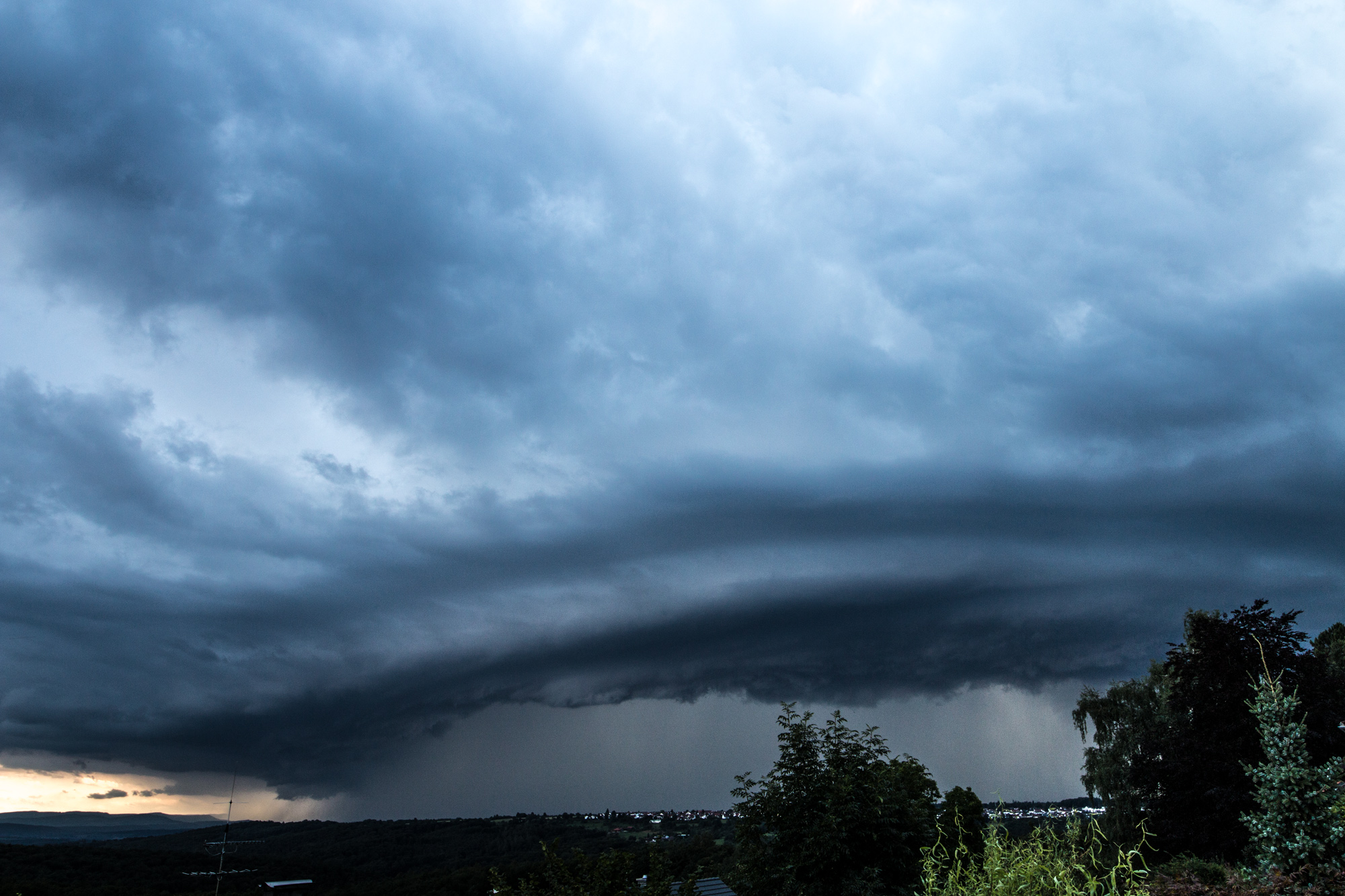 Herannahende Superzelle mit Starkniederschlag und enormer Blitzdichte